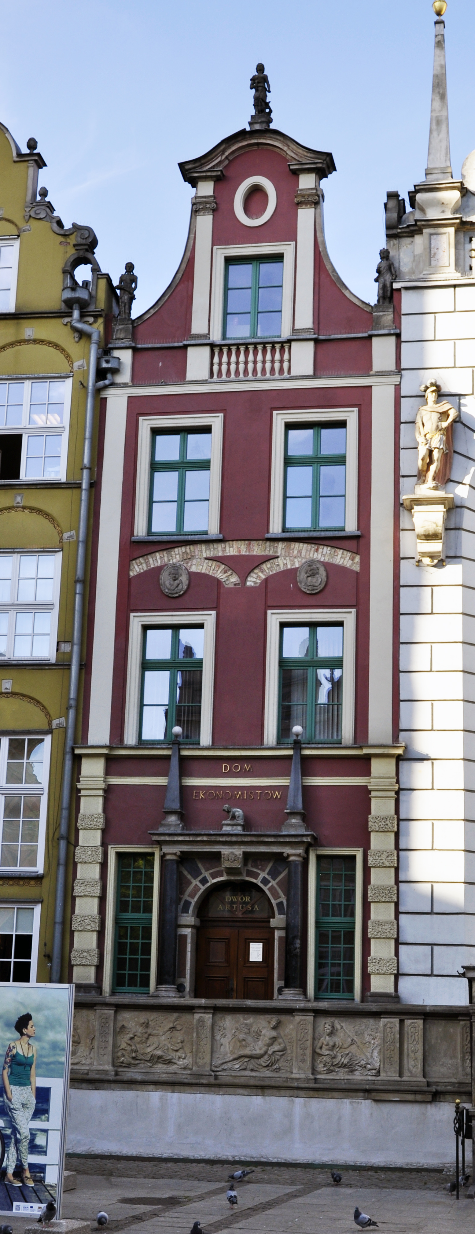 Gdańsk Główne Miasto, Długi Targ 45 - kamienica w zespole Dworu Artusa - Stary Dom Ławy